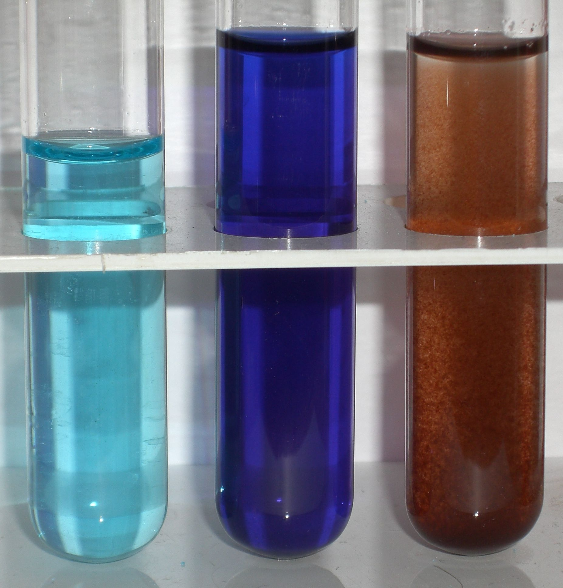 Nachweis von Kupfer(II)-Ionen (Copper(II) complexes; left is copper(II), middle is tetramminecopper(II) and right is copper ferrocyanide complex)